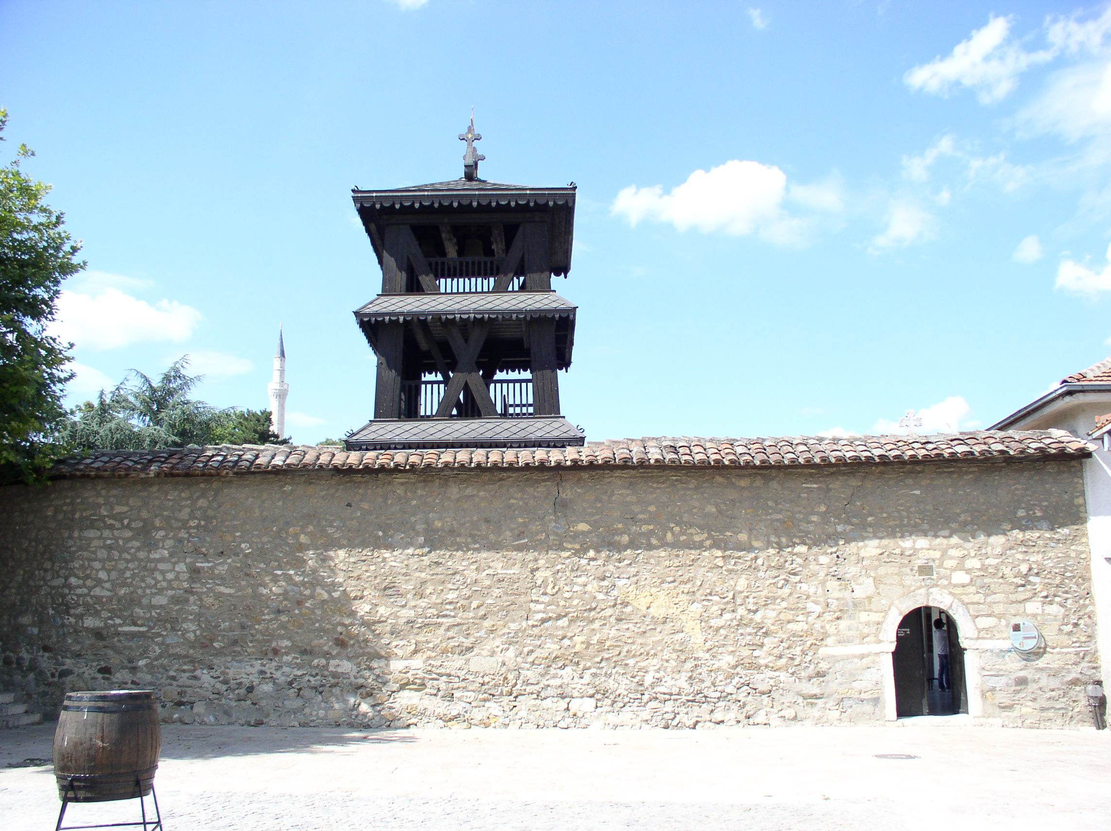 Звоник и зидине око цркве светог Спаса у Скопљу